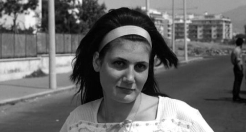 Screenshot from Mamma Roma directed by Pier Paolo Pasolini